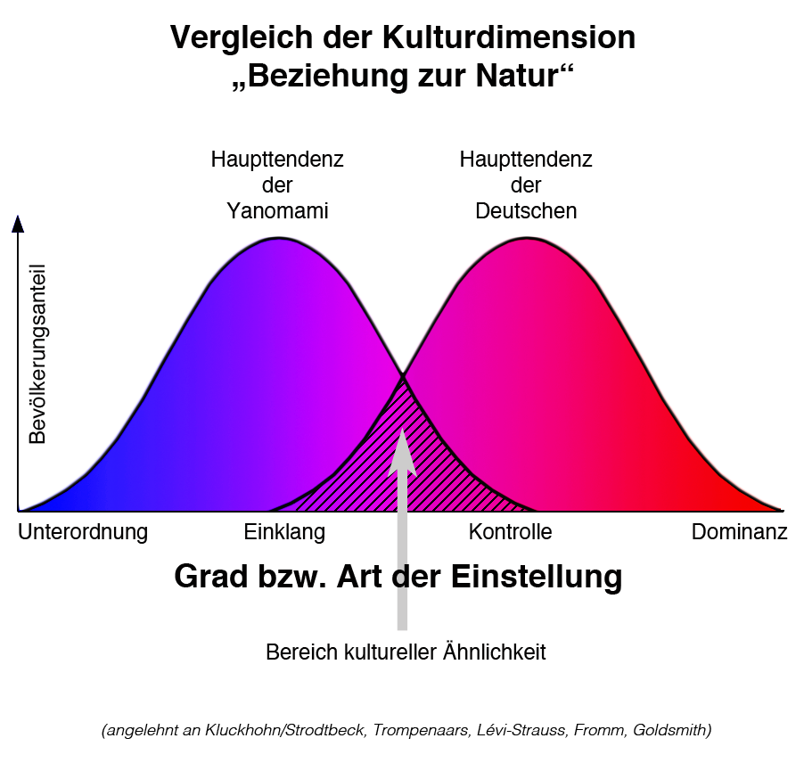 Vergleiches einer Kulturdimension